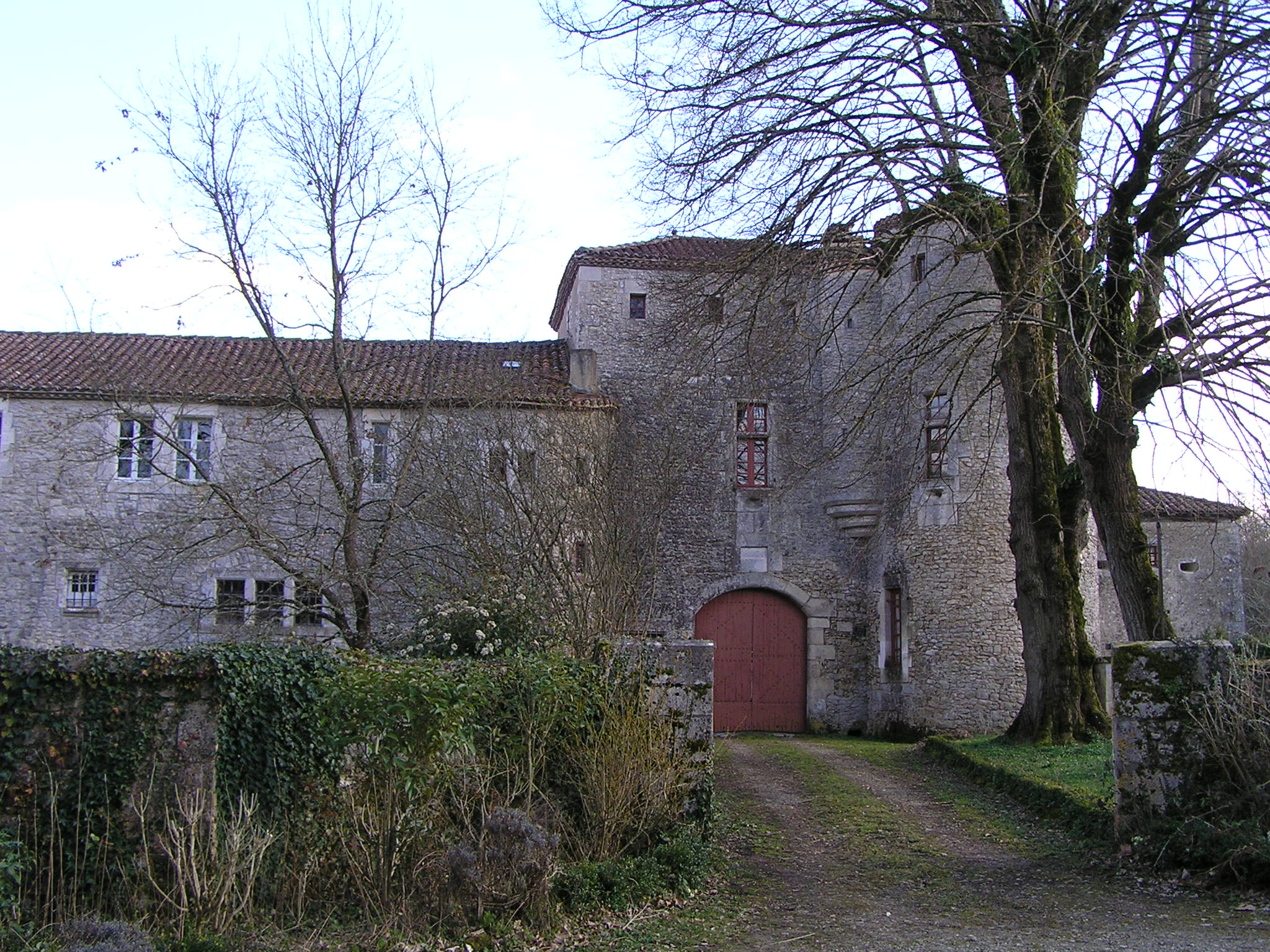 château de Rancogne